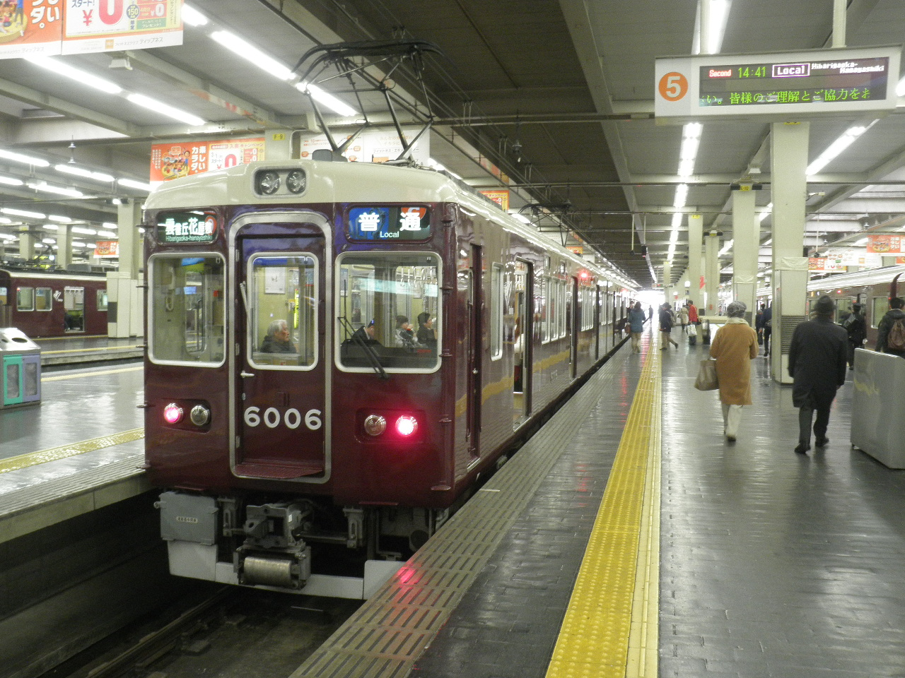 前面方向幕が大きい6006号車